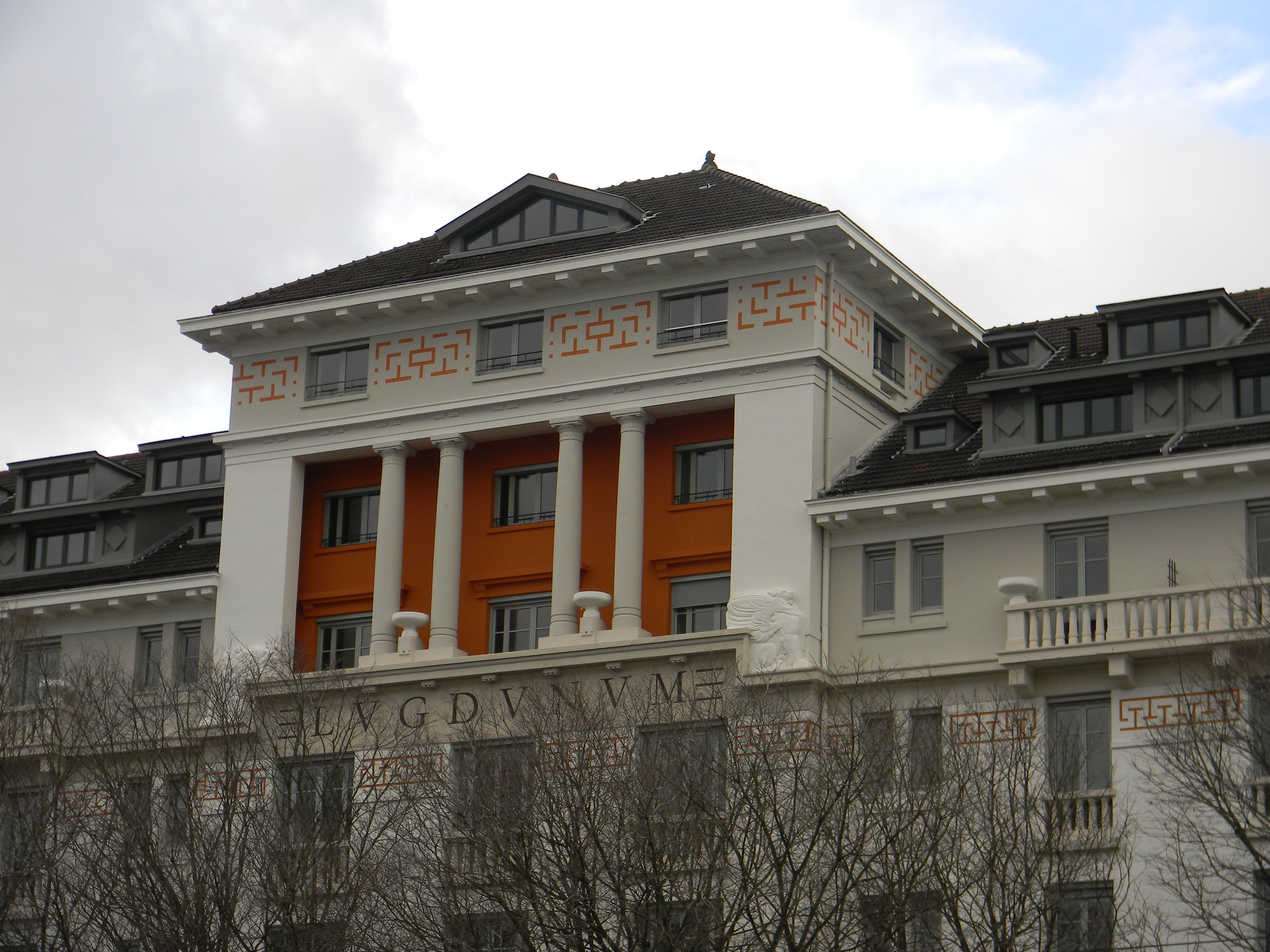 Hôtel "Lugdunum" au 5 place Jules Ferry, face à la gare des Brotteaux à Lyon.